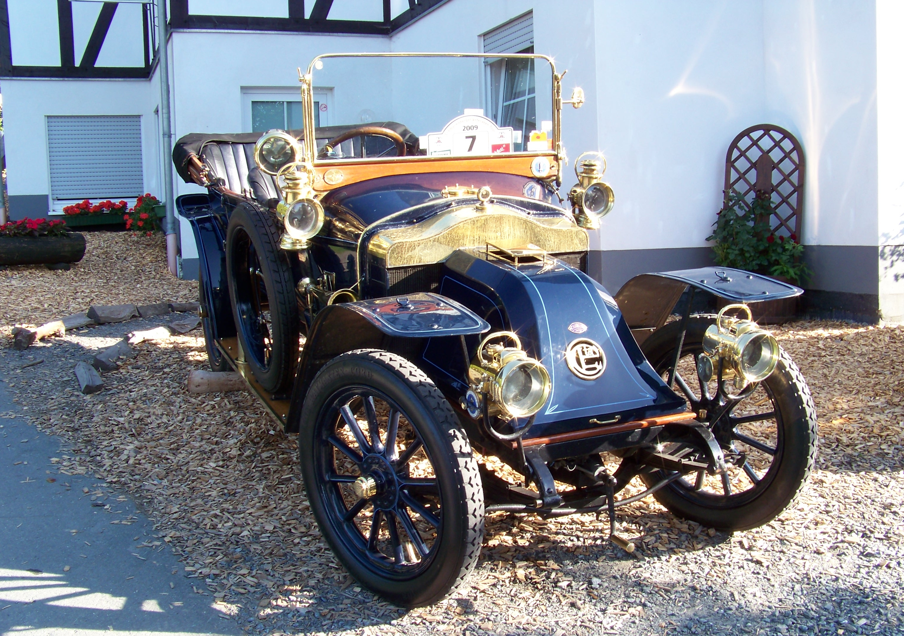 Charron Limited, bei der IV. Schmallenberger Veteranen-Tour, MSC-Schmallenberg (Germany)